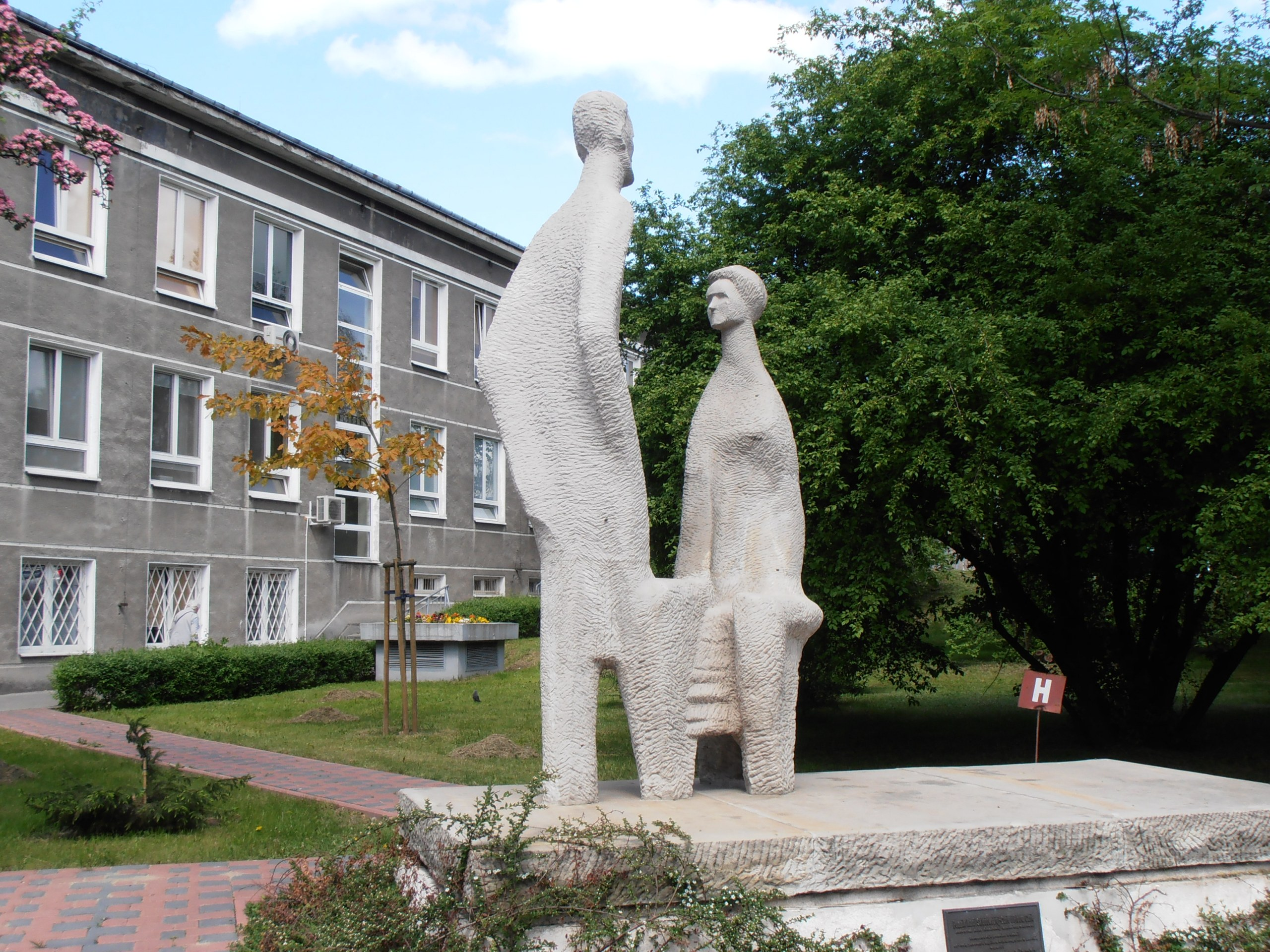 Pomnik małżonków Curie autorstwa Aliny Ślesińskiej w kompleksie szpitali przy ul. Jaczewskiego w Lublinie. Pomnik został ustawiony w roku 1964. Po znaczącej renowacji (m.in. rekonstrukcja postaci Marii) ponownie został odsłonięty 28 września 2009 r.